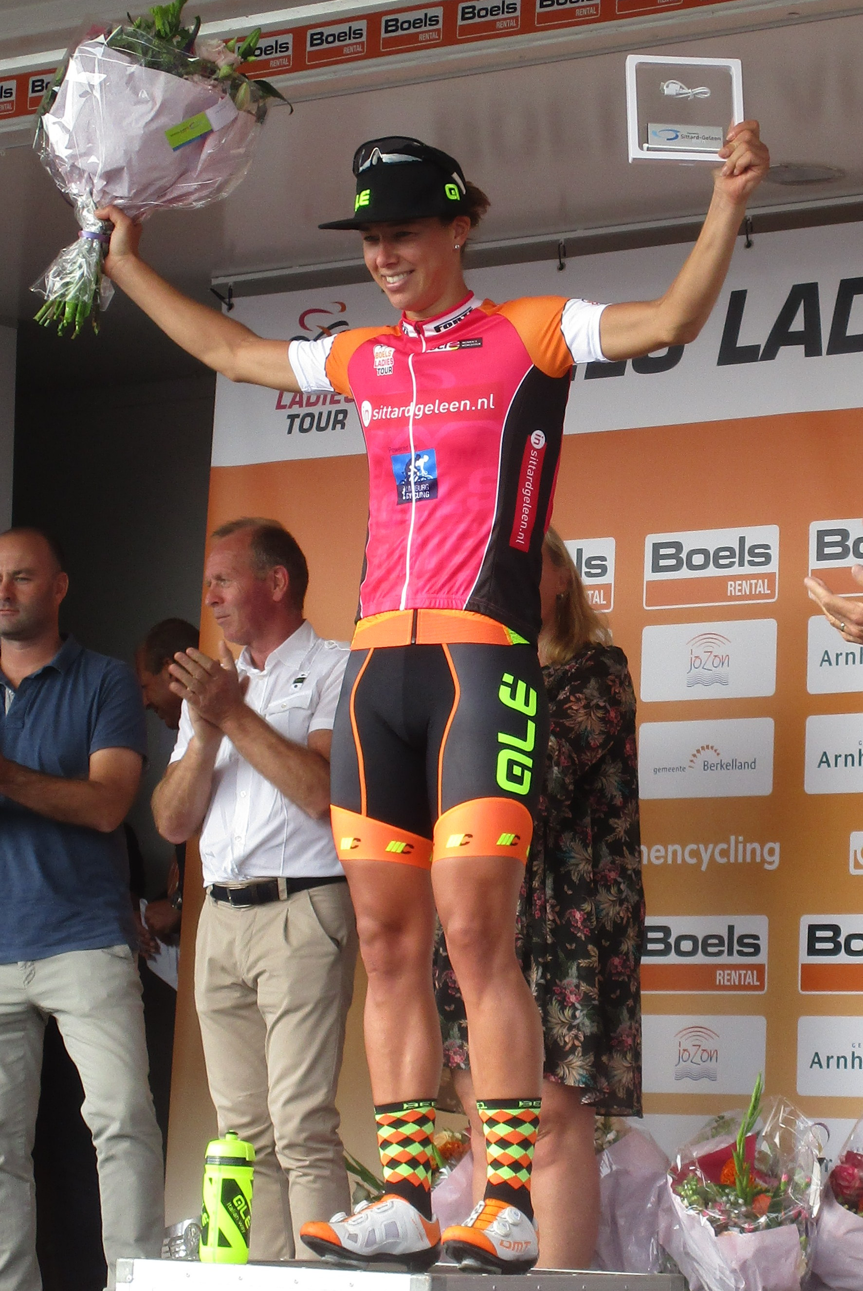 Huldiging van de winnaars van de Boels Ladies Tour 2017 op het Tom Dumoulin Bike Park in Sittard-Geleen.